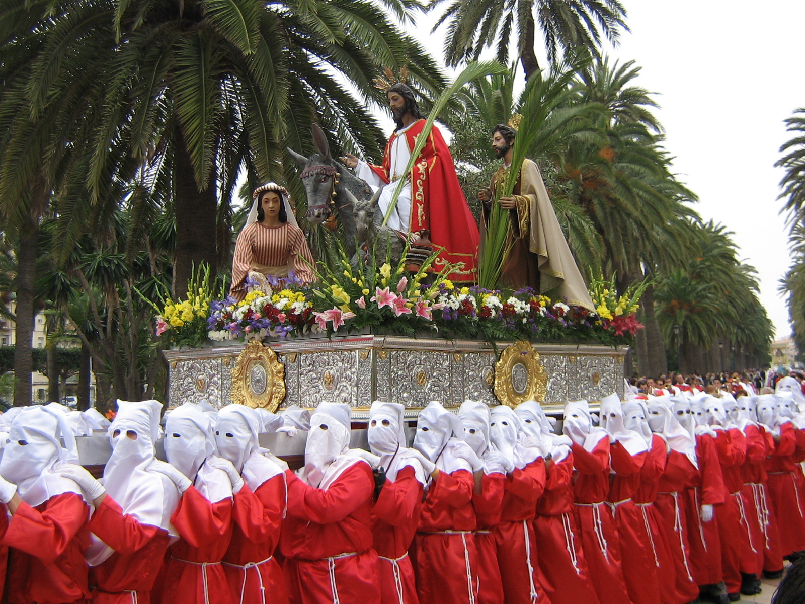 Nuestro Padre Jesús a su entrada en Jerusalén - Domingo de Ramos 2006 - Melilla (España)